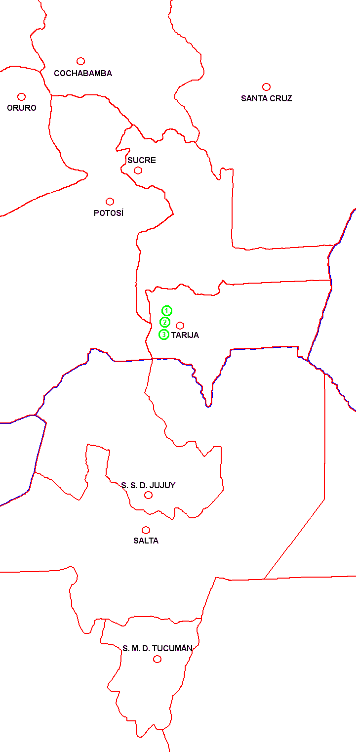 Rebutia colorea - range map